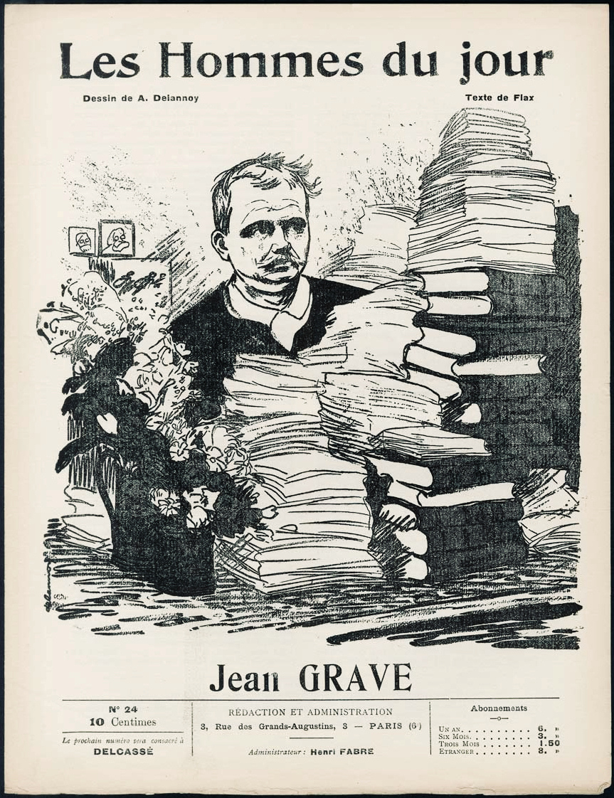 Jean Grave, né le 16 octobre 1854 à Le Breuil-sur-Couze (Puy-de-Dôme) et mort à Vienne-en-Val (Loiret) le 8 décembre 1939, est un activiste important du mouvement libertaire français. - Les Hommes du jour n° 24 - dessin de Aristide Delannoy